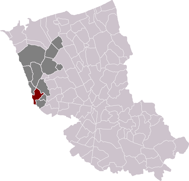 Locatie gemeente Waten in arrondissement Duinkerke. Zelfgemaakt. Location of Watten municipality in the arrondissement of Dunkirk. Self made. Localisation de la commune de Watten dans l'arrondissement de Dunkerque. Fait moi-même.